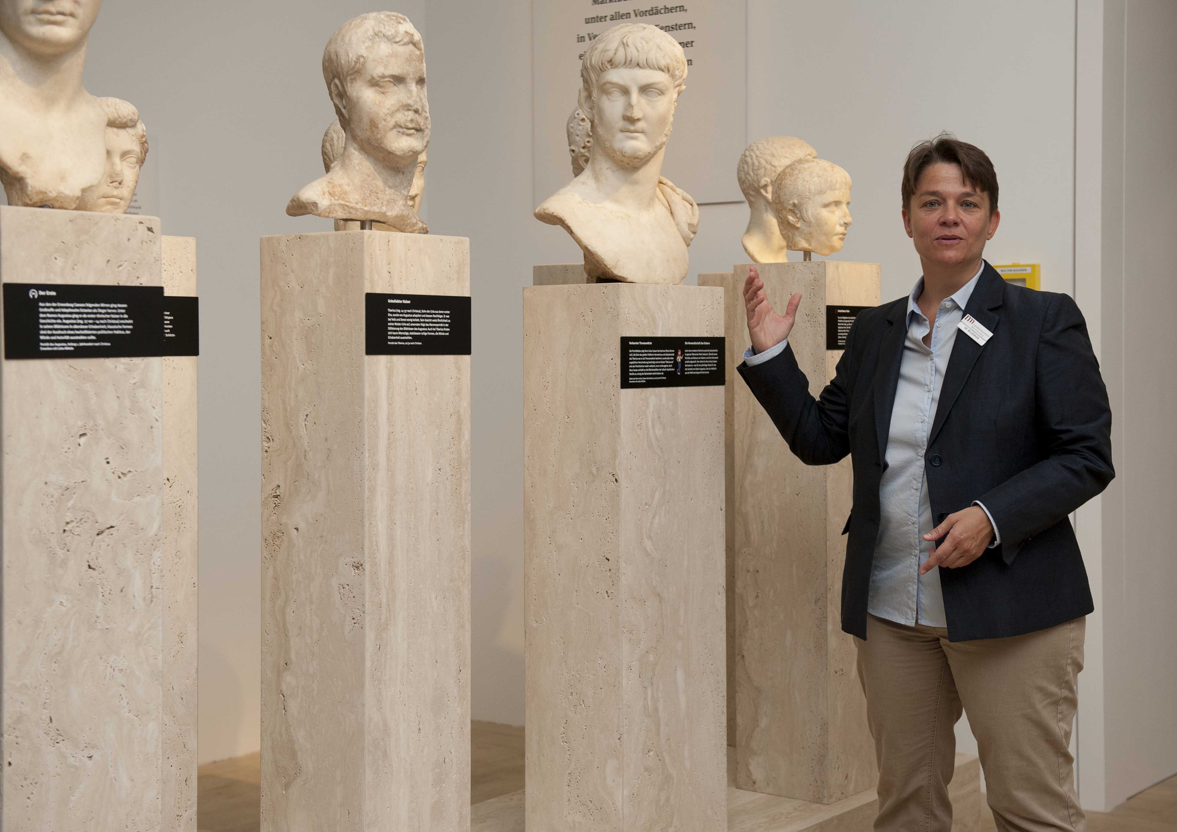 Nina Willburger bei einer Führung in der Antikensammlung des Landesmuseums Württemberg.